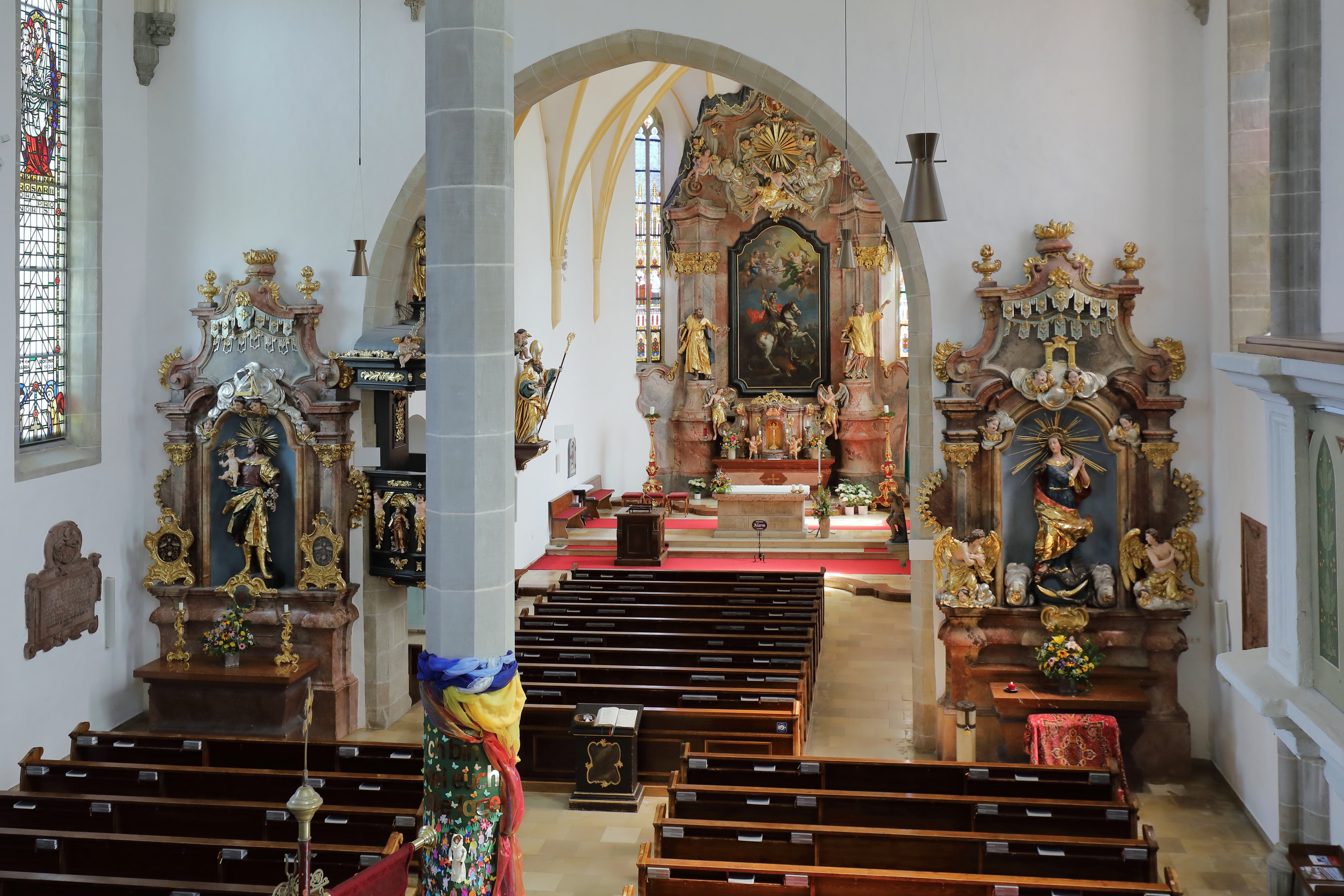 Innenansicht der röm.-kath. Pfarrkirche hl. Georg in der oberösterreichischen Marktgemeinde St. Georgen im Attergau.